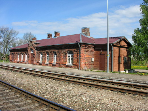 Pumpurai, Mažeikių raj., Mažeikių apylinkės seniūnija Foto: Algirdas, 2006 m. gegužės 17 d.